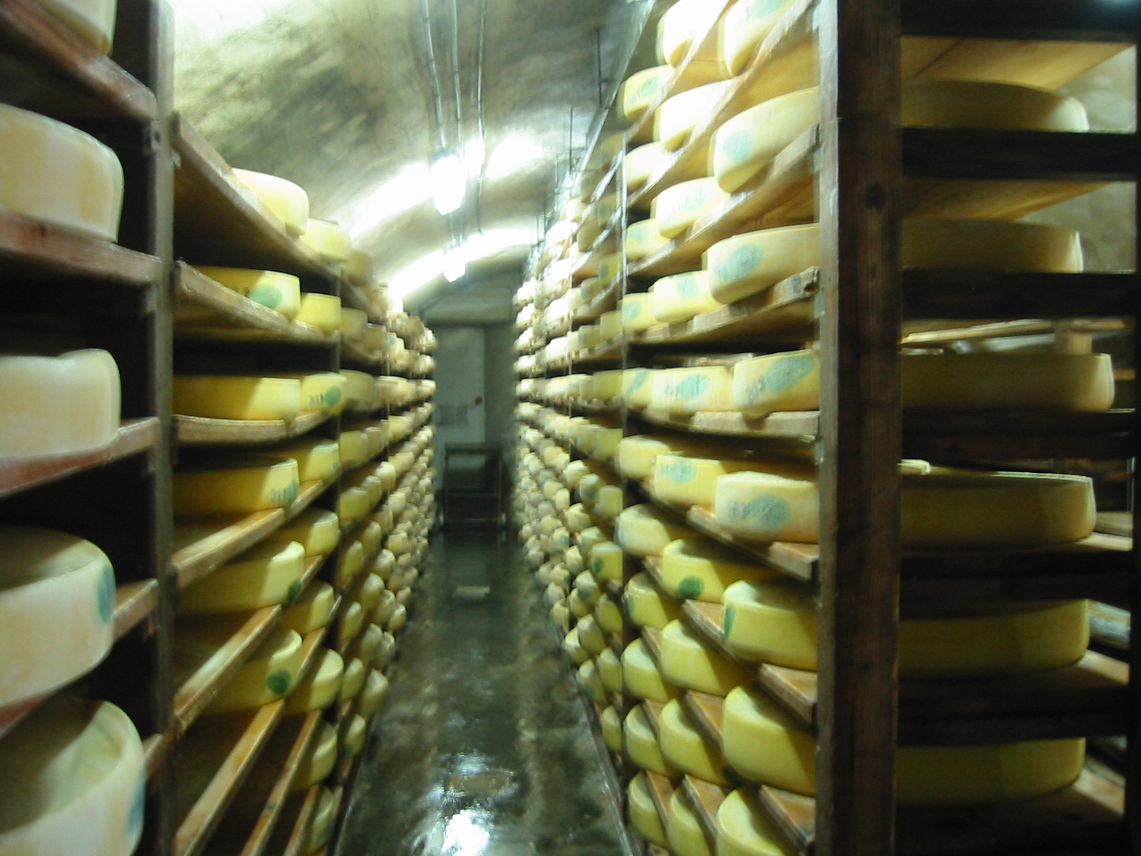 Un étage d'une fruitière à comté.